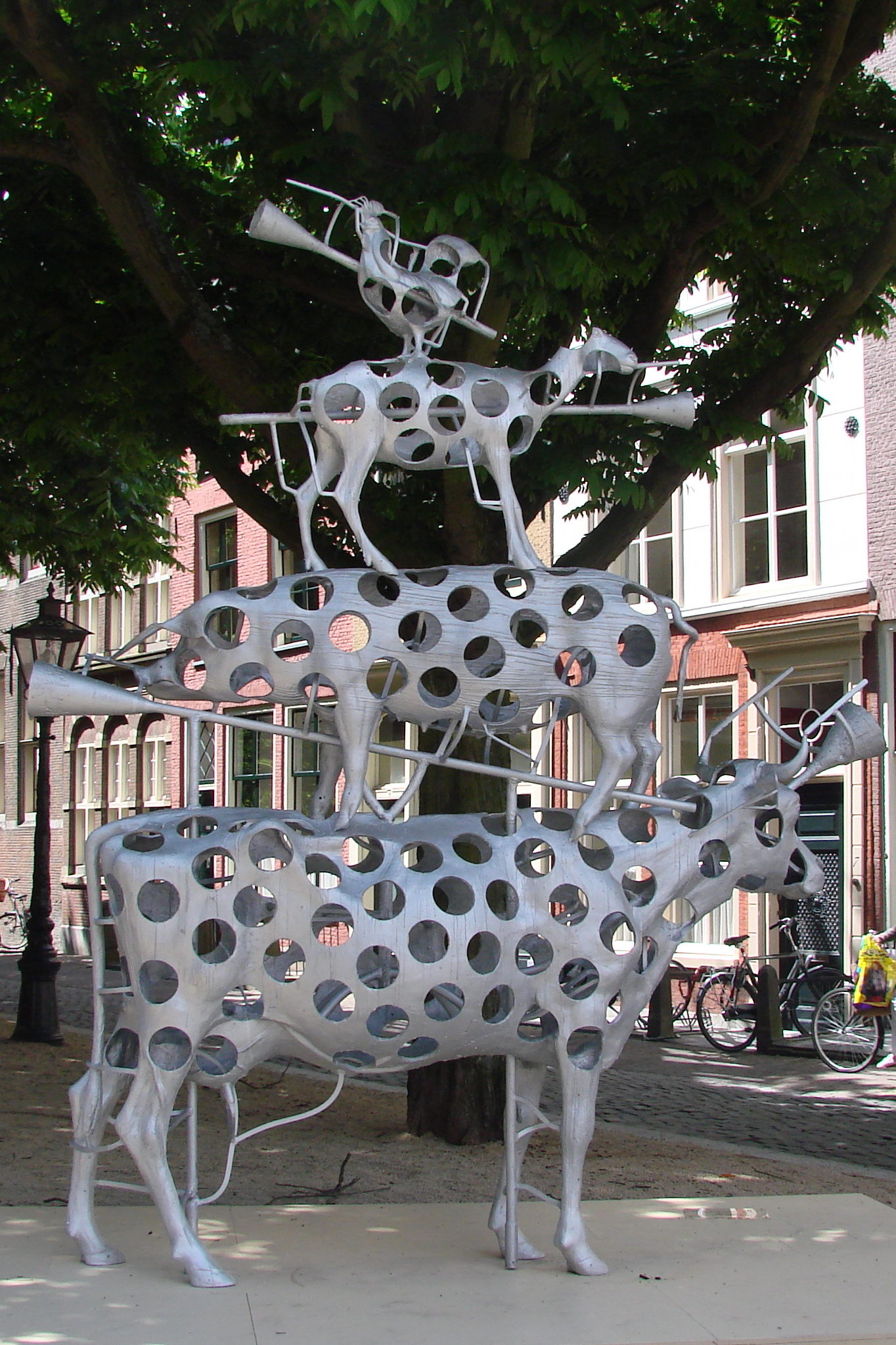 Guido Geelen - Diersculpturen - 2012. Tentoongesteld op de openluchttentoonstelling 'Beelden in Leiden', Hooglandse Kerkgracht, zomer 2012.